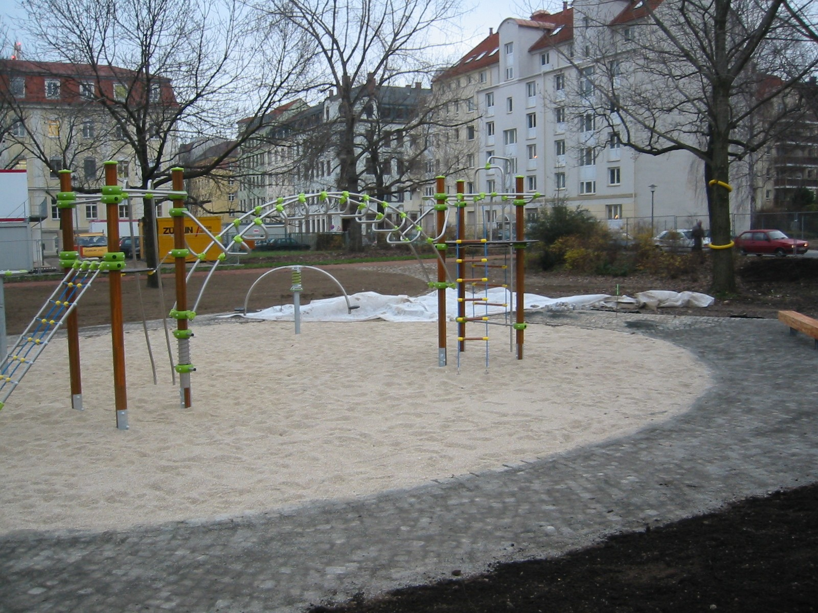 Spielplatz aus Fluthilfefond in Dresdener Friedrichstadt